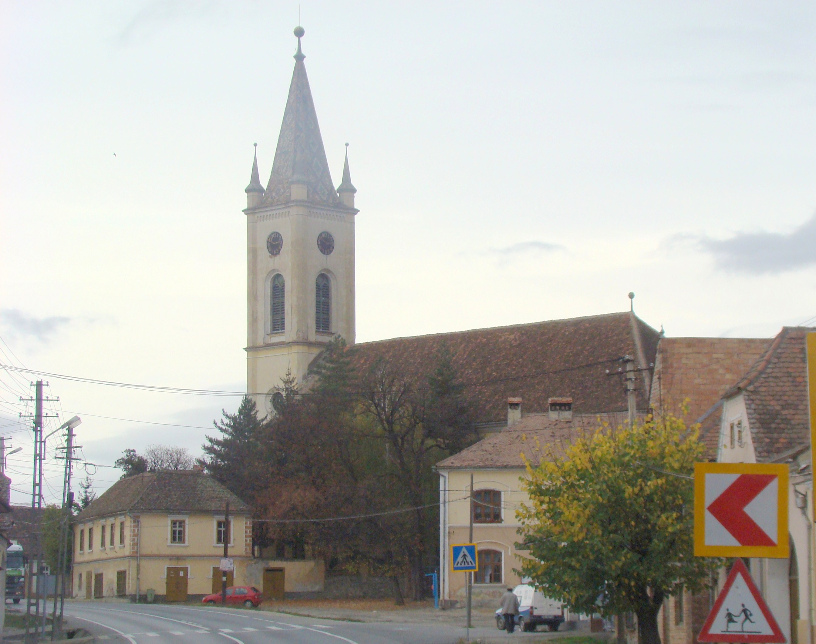 Evangelische Kirche von Apoldu de Sus (Großpold), Siebenbürgen, RumänienRomână: Biserica Evanghelică-Lutherană din Apoldu de Sus (Großpold), Transilvania, România